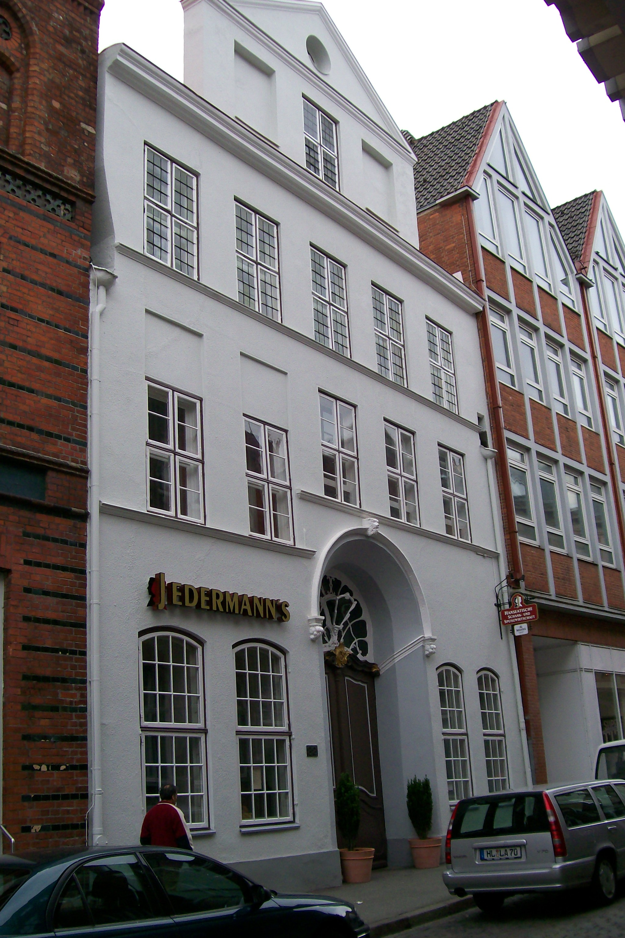 Dr.-Julius-Leber-Straße 32 in Lübeck, Schleswig-Holstein, Germany